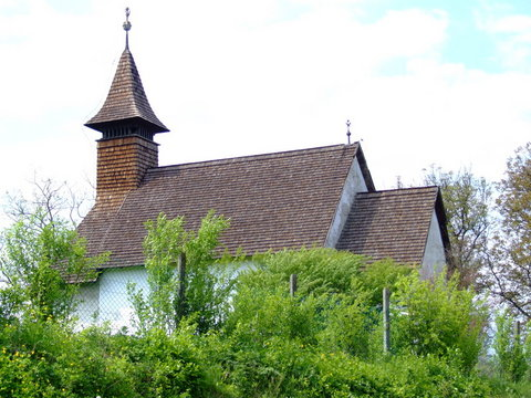 Rakacaszendi templom.